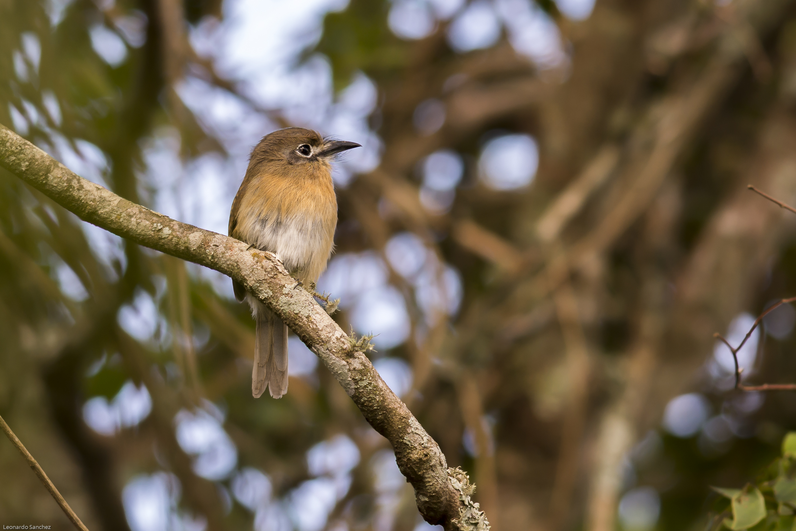 Espécie rara e de difícil observação.